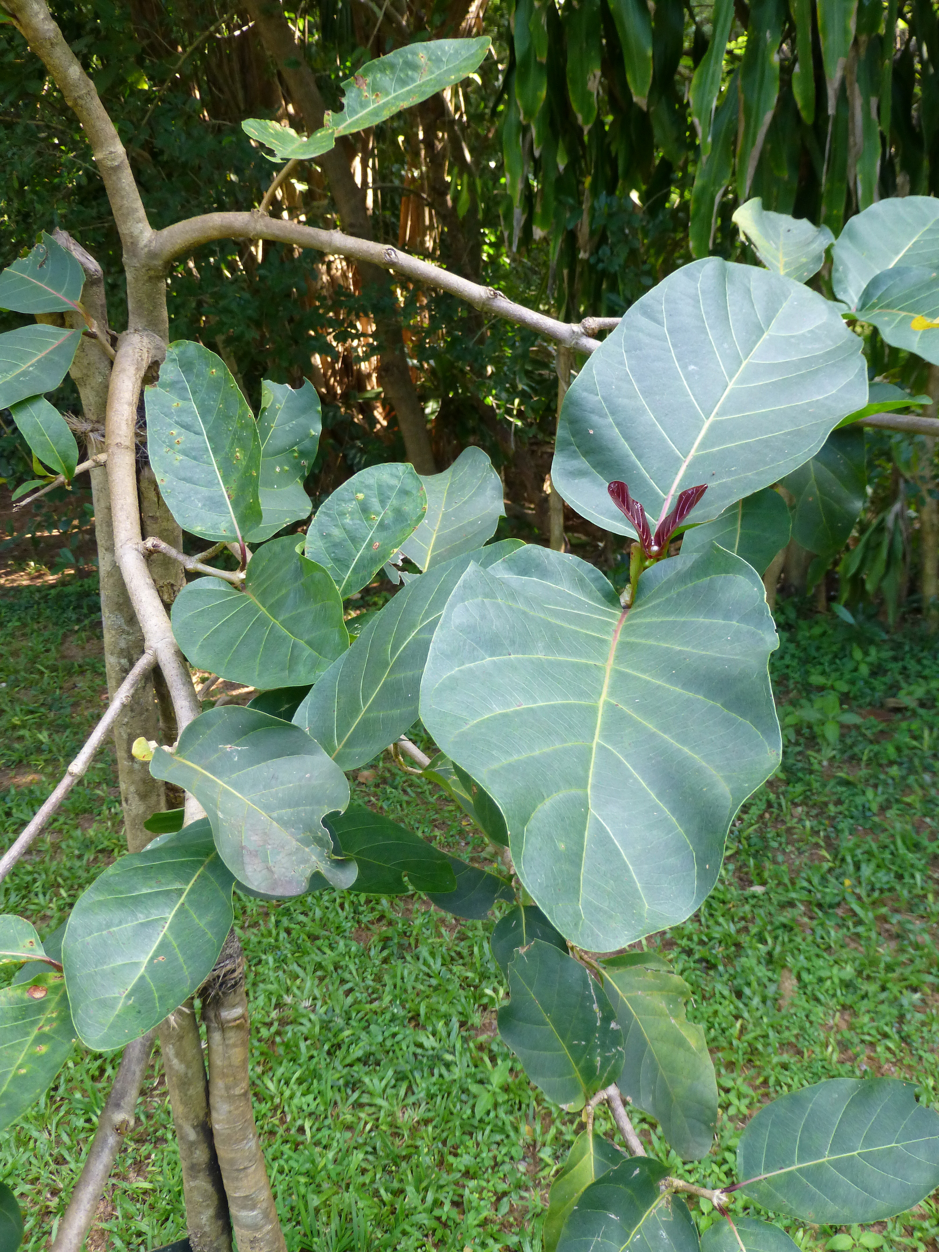 Bakhmee (Nauclea orientalis), Sigiriya Village, Sri Lanka